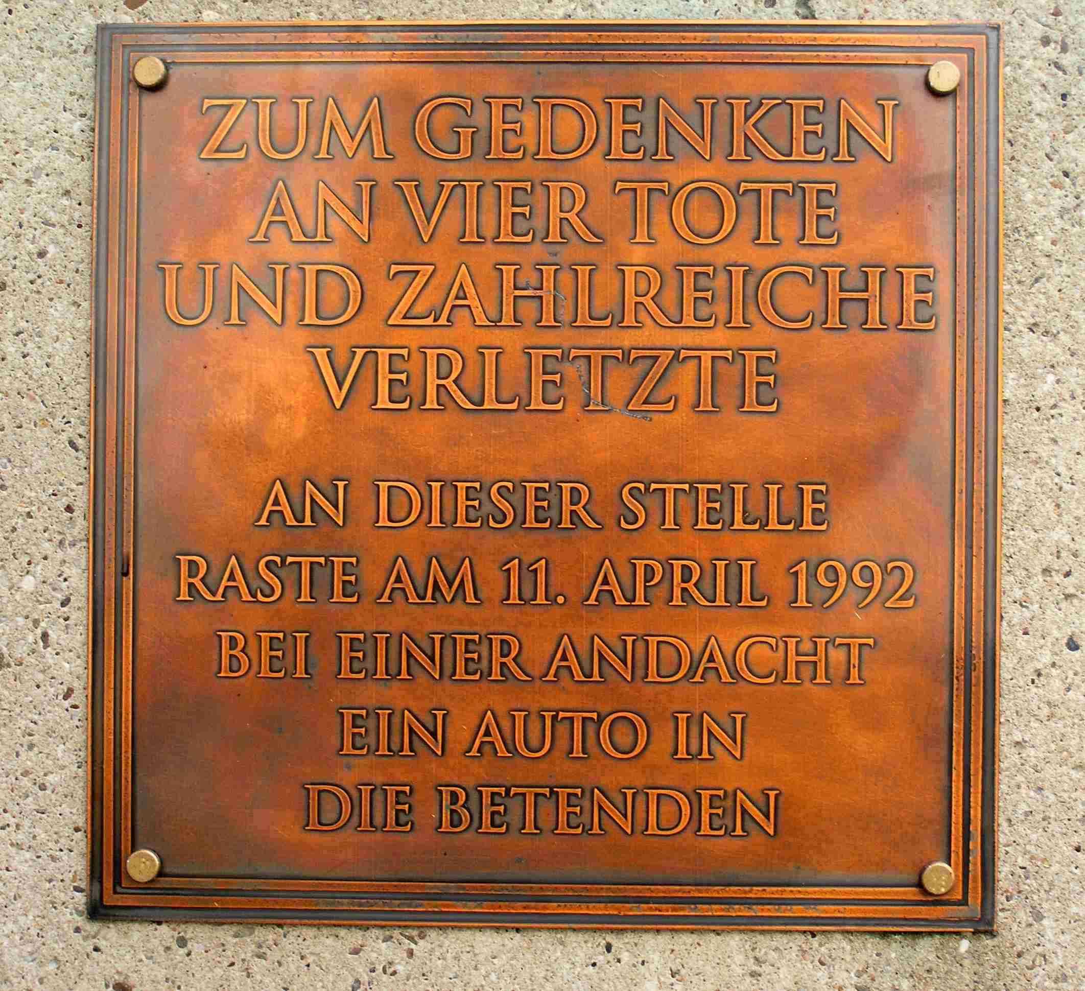 Diese Tafel wurde zur Erinnerung an den Verkehrsunfall an der Kapelle angebracht.